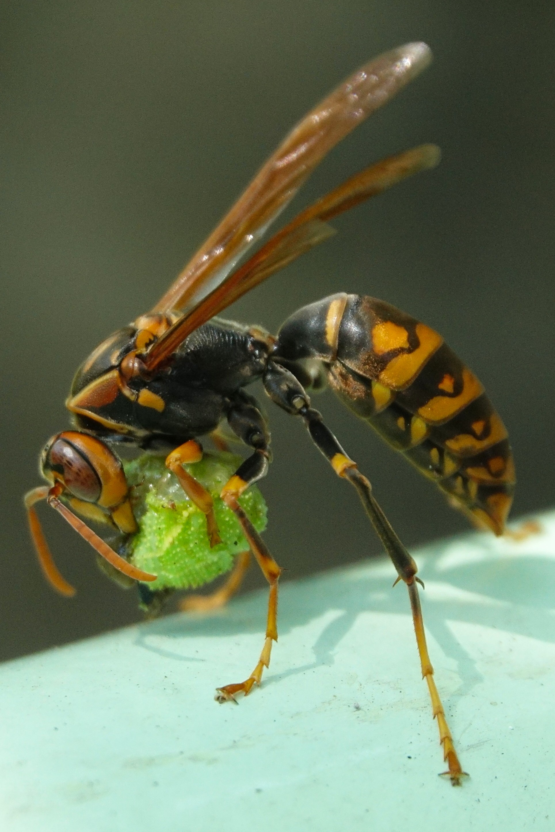 肉団子を作るセグロアシナガバチ 日本東海地方